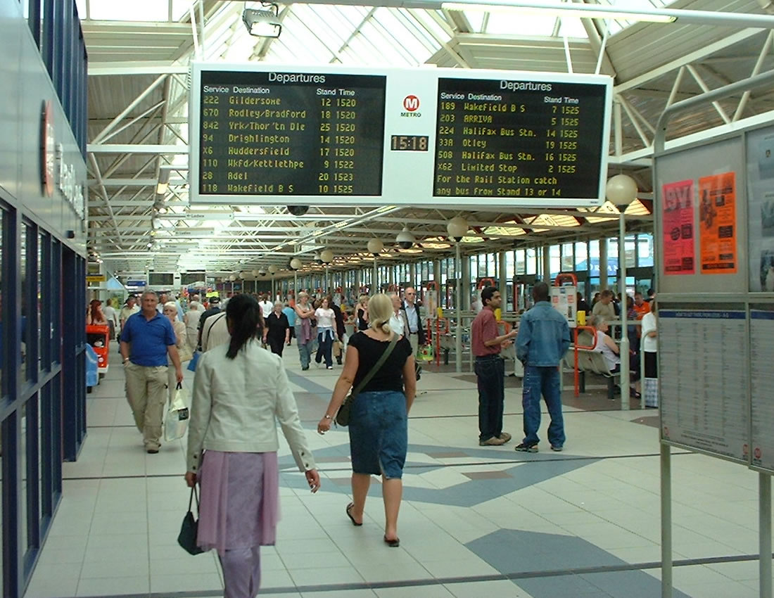 Bus concourse